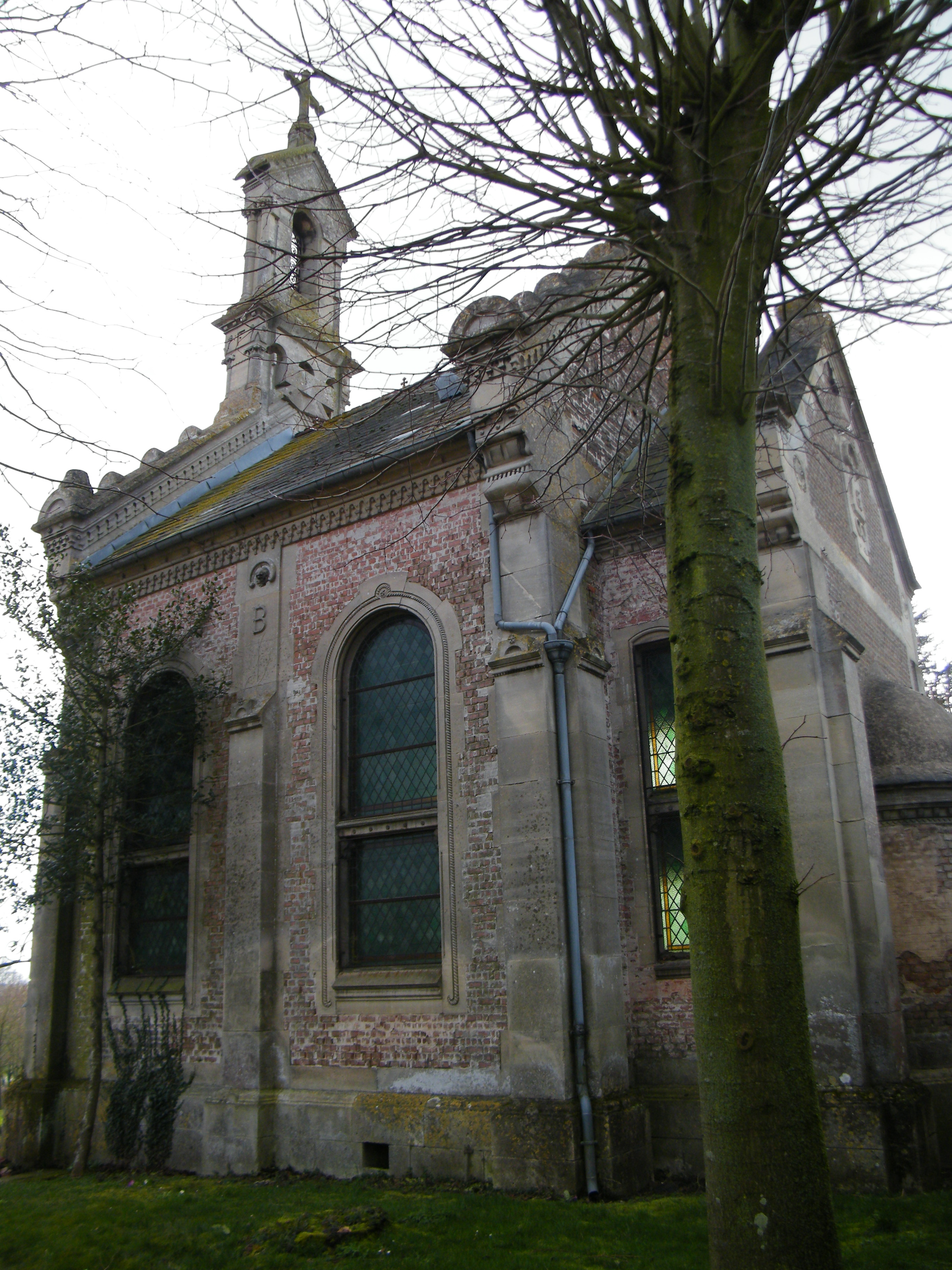 Chapelle funéraire, près de l'église.